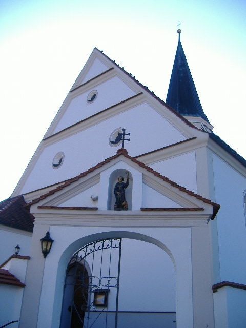 Katholische Filialkirche St. Vitus in Erlingshofen, einem Ortsteil von Tapfheim im Landkreis Donau-Ries (Bayern)